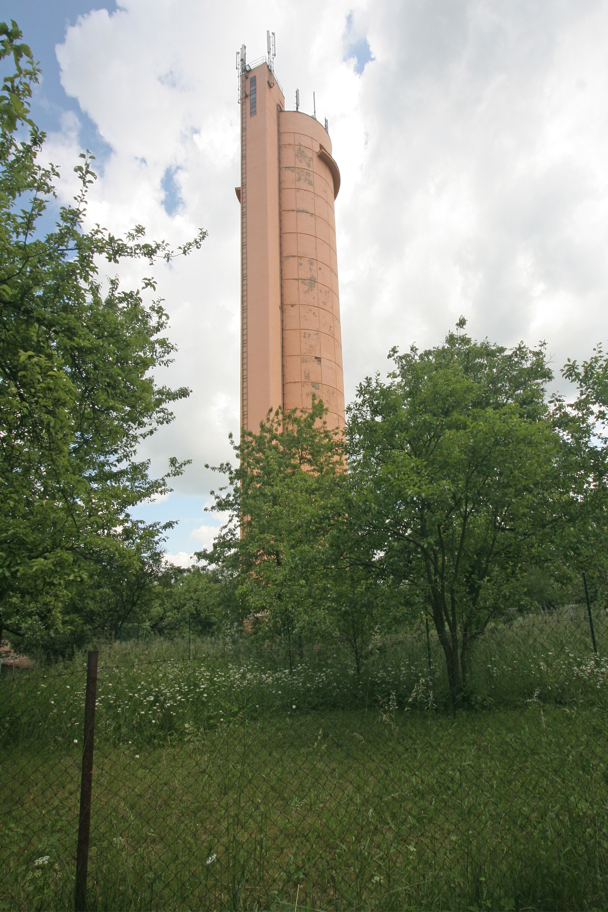 Práčov vodárenská vyrovnávací věž